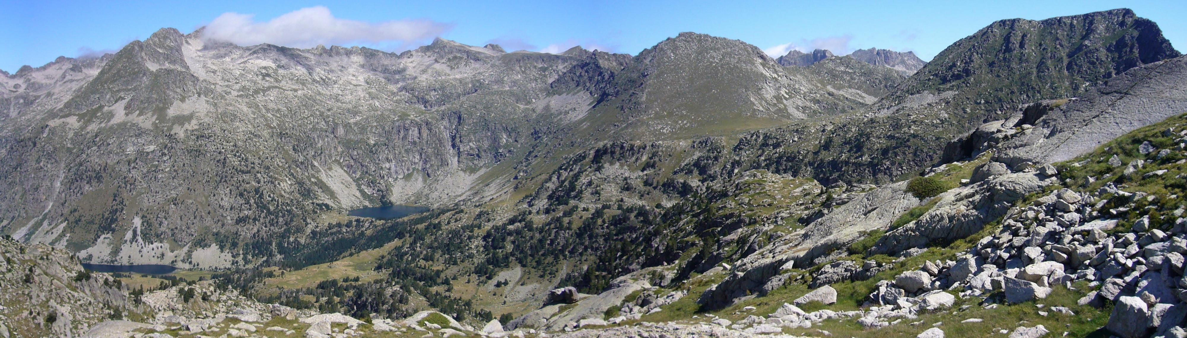 Estany Llong, Colomers d’Espot i Portarró d’Espot, vistos des de la Coma de Pescadors; la Vall de Boí, Alta Ribagorça, Catalunya